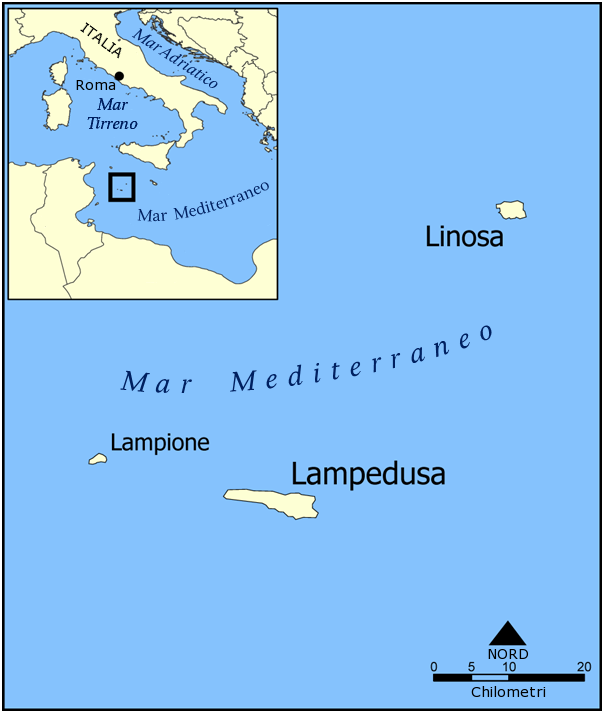 Ricavata da Pelagie islands blank map.png